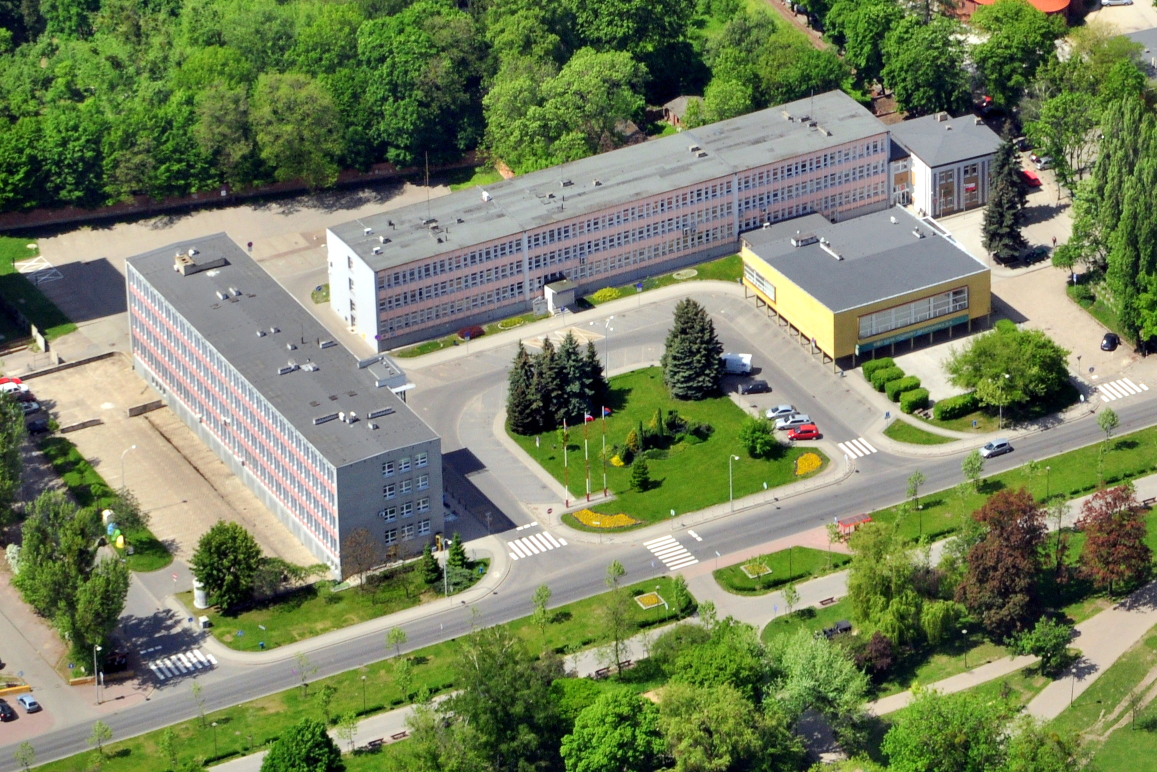 Ostrów Wlkp., al. Powstańców Wielkopolskich. Siedziby samorządów, Urzędu Miejskiego w Ostrowie Wlkp., Starostwa Powiatowego w Ostrowie Wlkp. i Urzędu Gminy Ostrów Wlkp.